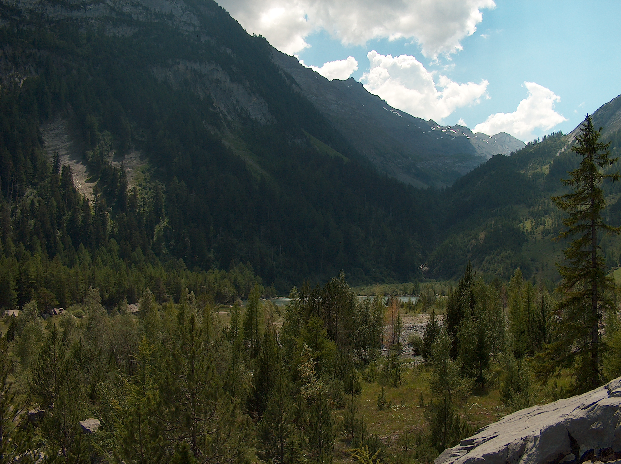 near Lac de Derborence